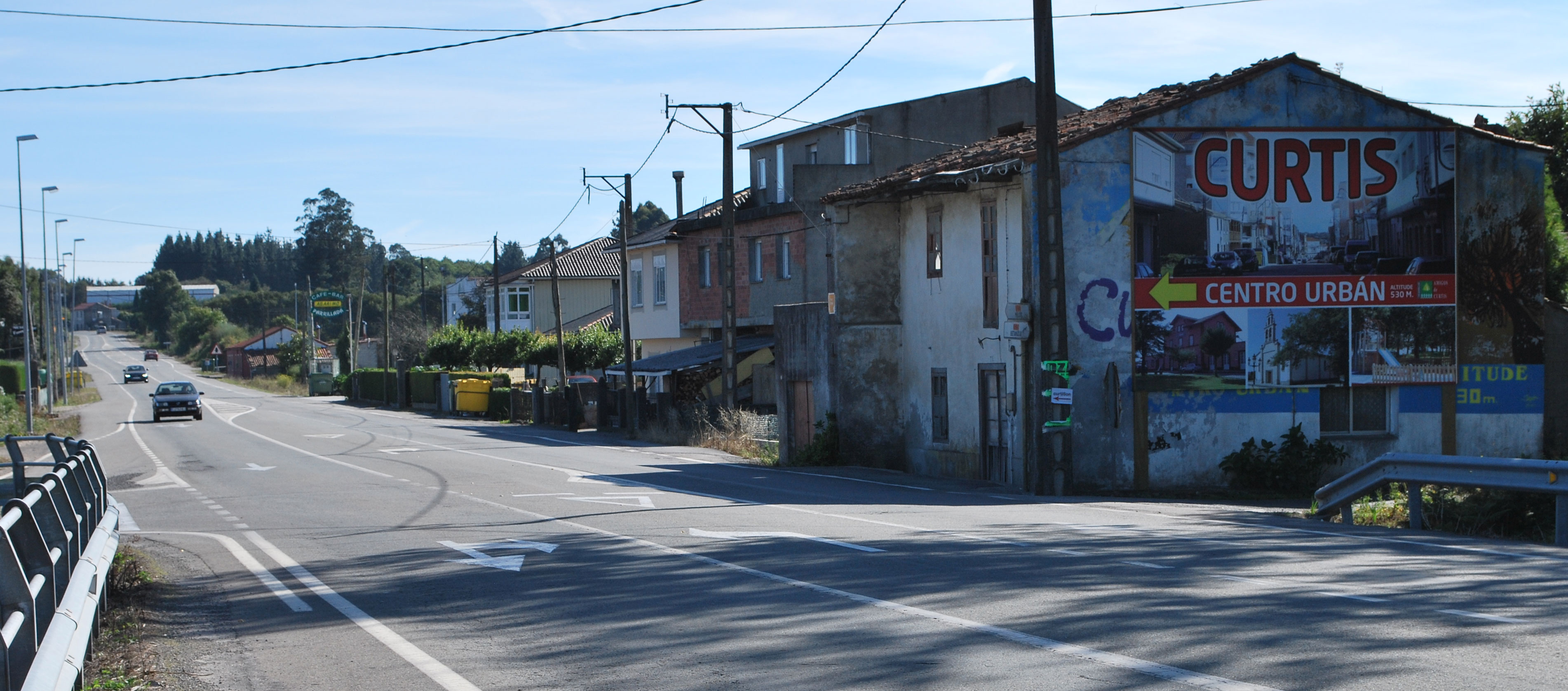 Vista da estrada da Coruña na Raia, Curtis